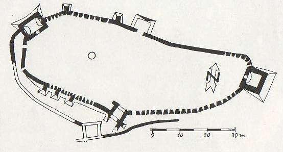 Planul cetatii din Feldioara.